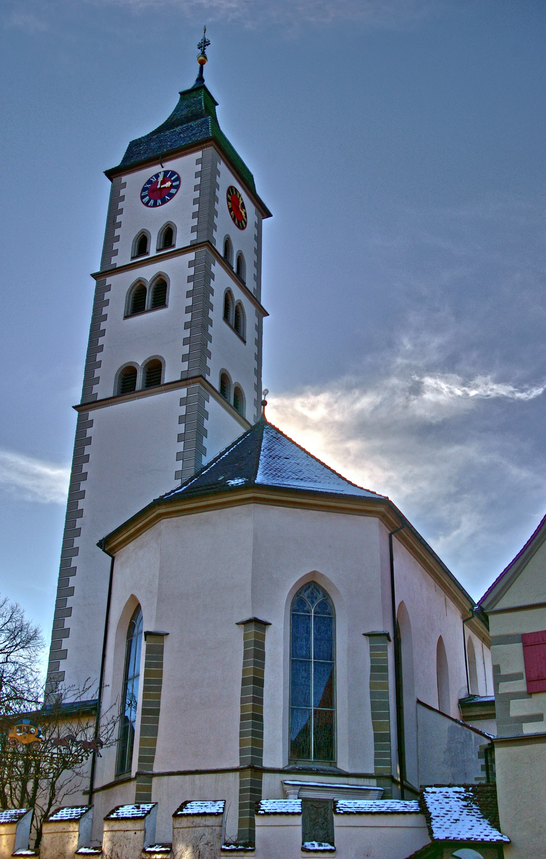 St. Martins-Kirche in Wangen